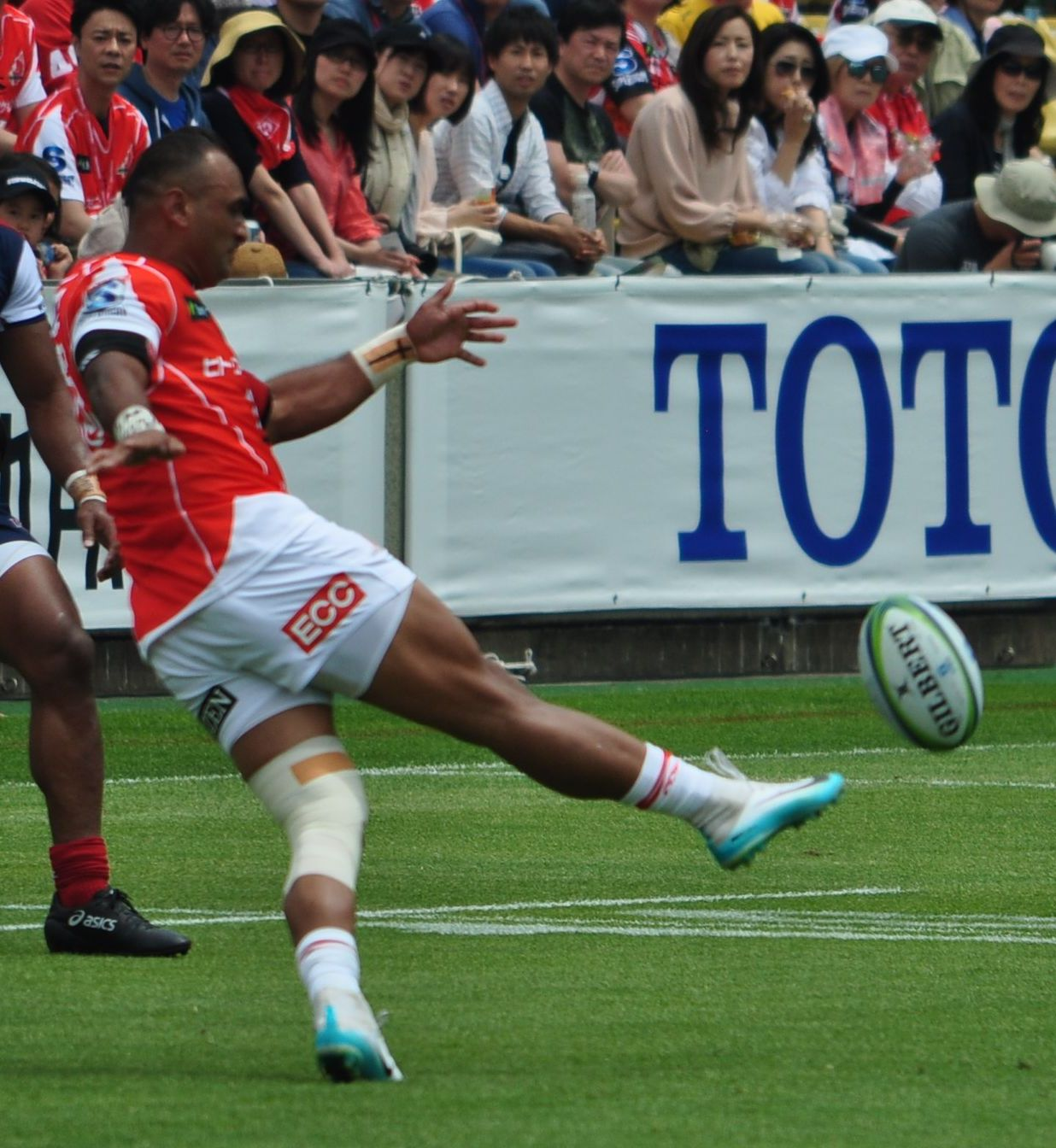 セミシ・マシレワ